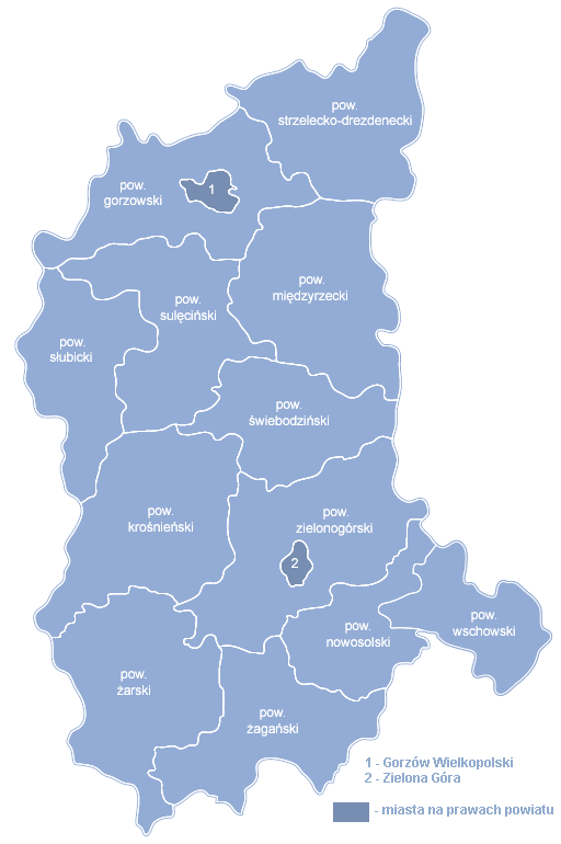 Podział administracyjny województwa lubuskiego na powiaty i miasta na prawach powiatu